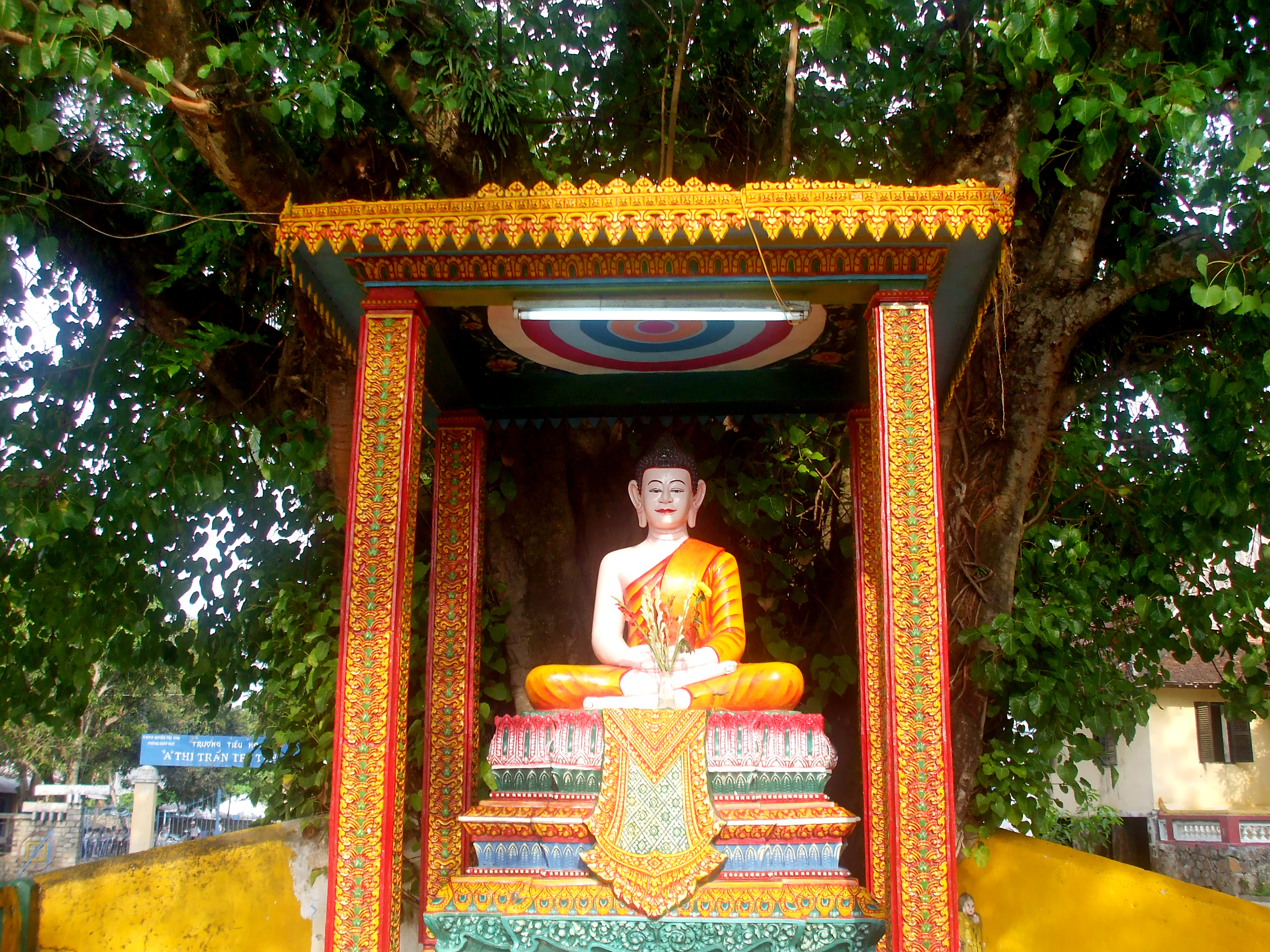 Tượng Phật Thích Ca trong khuôn viên chùa Xà Tón ở thị trấn Tri Tôn, huyện Tri Tôn, tỉnh An Giang, Việt Nam.